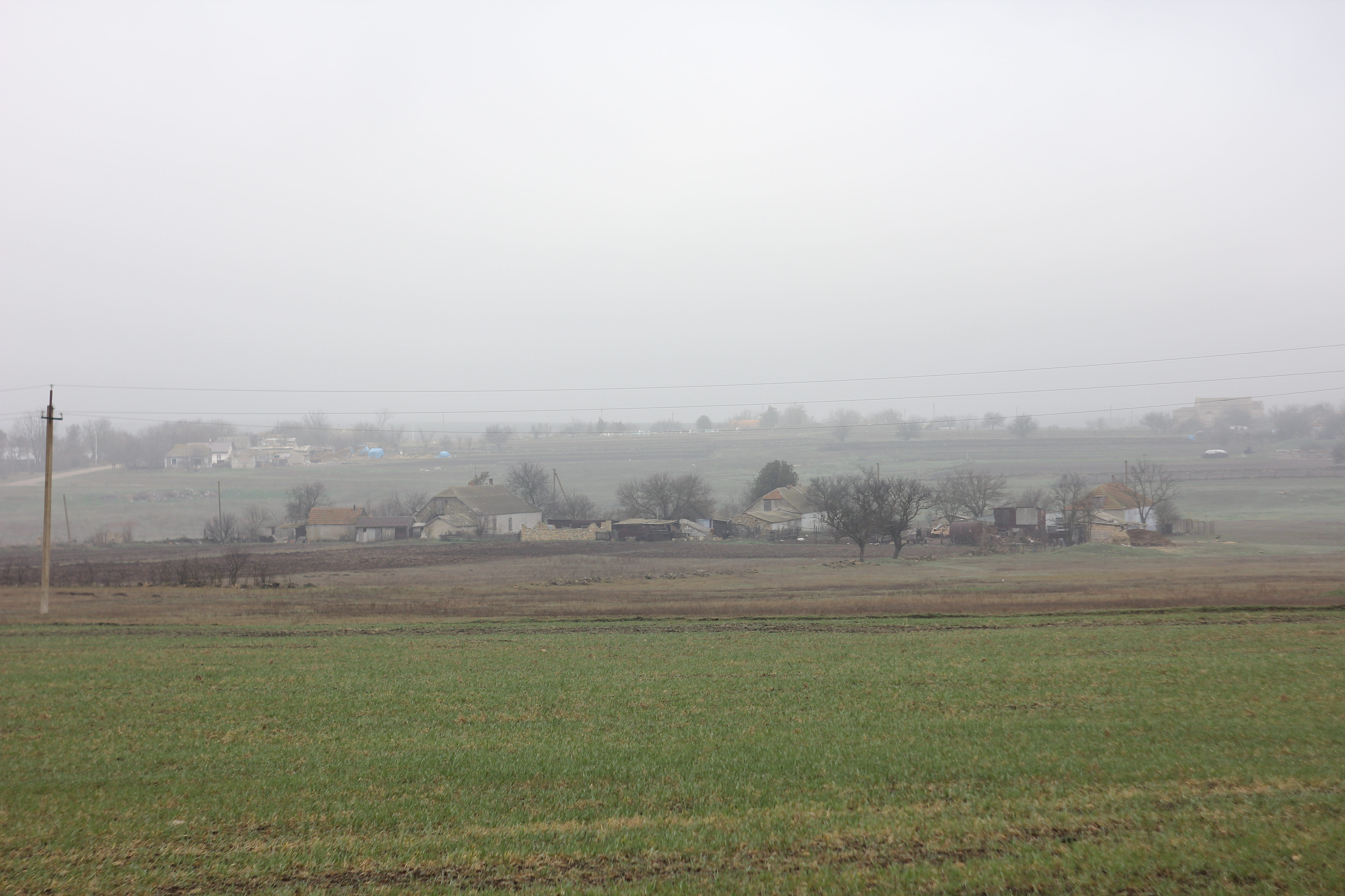 Novoselovka (Mykolaiv region)